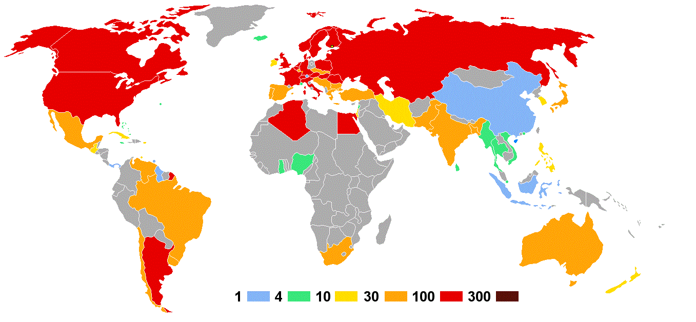 Olympische Sommerspiele 1952 — Anzahl der Athleten